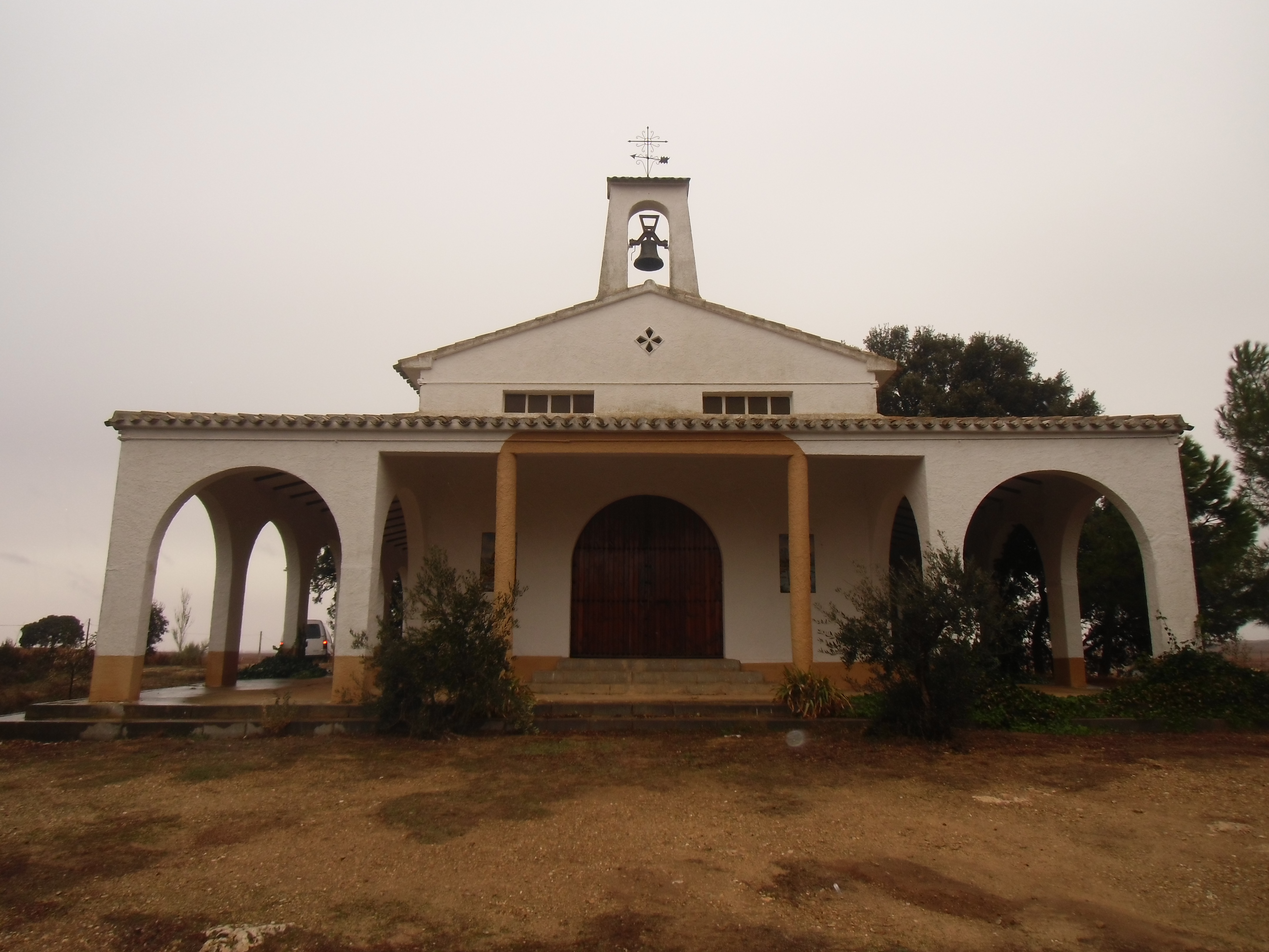 Esta es la Ermita de San Cristobal